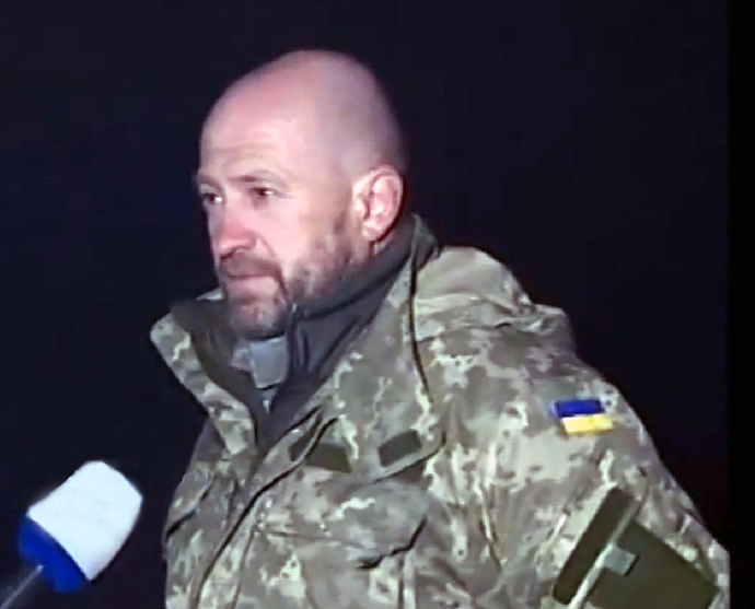 Євген Пташник, замкомандира батальйону «Айдар», 6 листопада 2014.